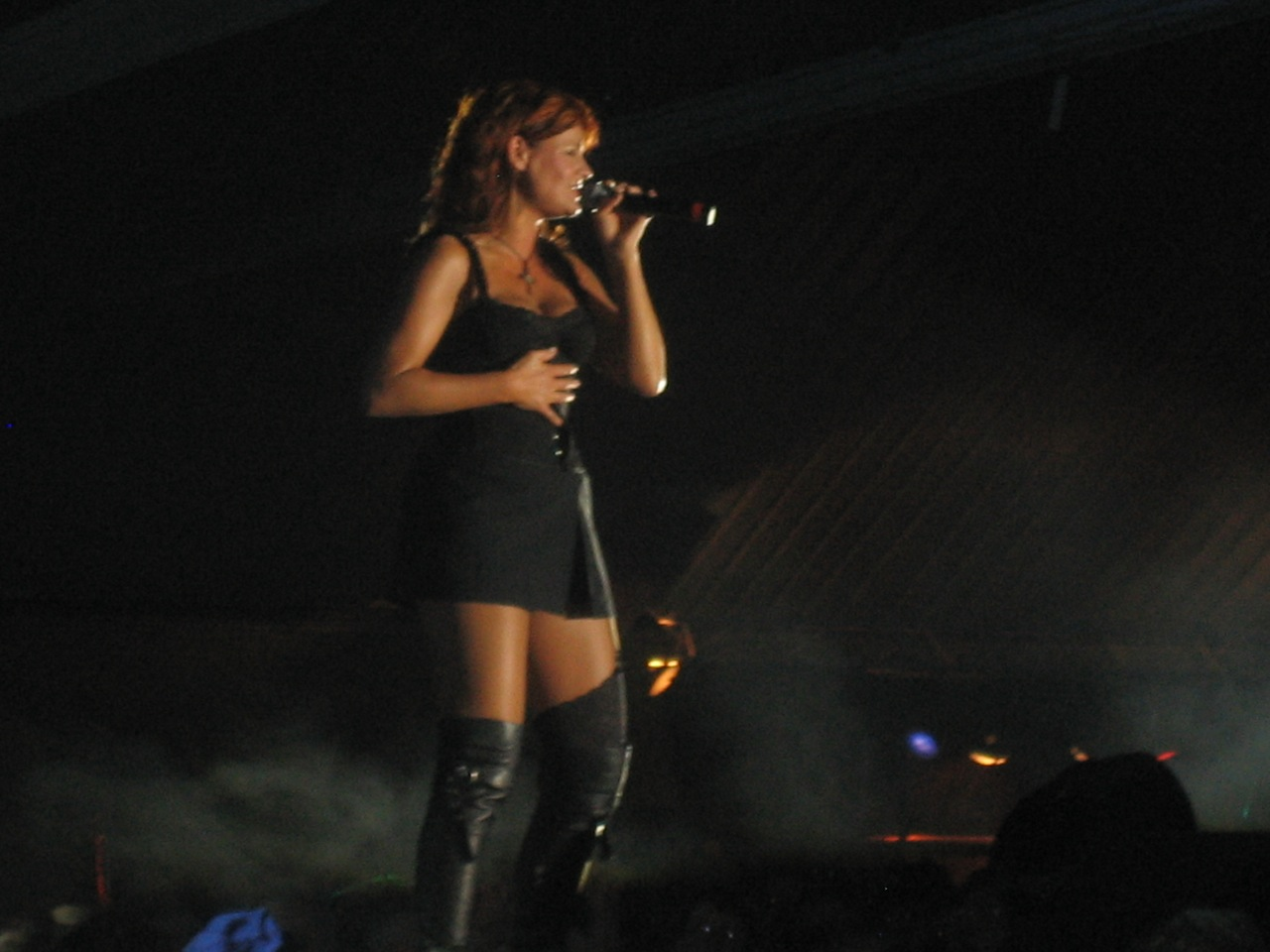 Andrea Berg in concert in Salzwedel, March 2007